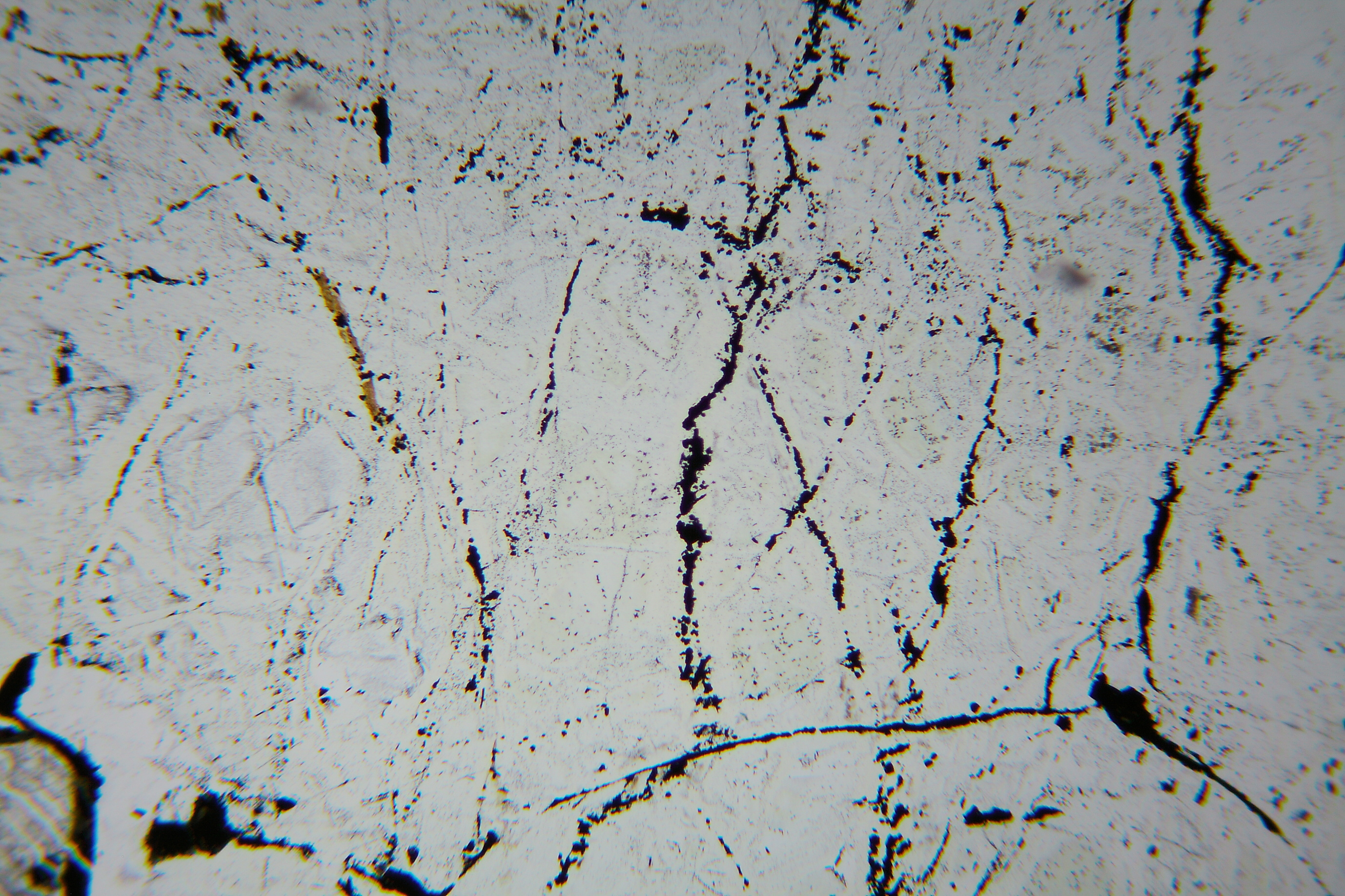 Serpentinit (Dünnschliff, LPL): Die Maschenstruktur ist nur andeutungsweise sichtbar; Schnüre von Magnetit-xx (schwarz)